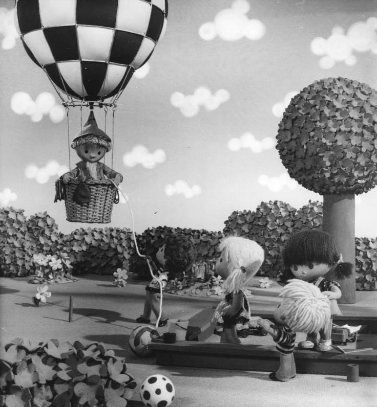 ADN-ZB/Deutsche Demokratische Republik 28.11.194 Sandmänchen beginnt 25. Geburtstag (2 Motive) Der Freund der Kinder in der DDR, der 25 Zentimeter kleine Fernsehstar Sandmännchen, hat trotz seiner allabendlich einschläfernden Wirkung einen großen Zuschauerkreis für sein 10-Minuten-Programm. Seine Beliebheit ist so groß, daß er sich seit 1979 sogar einen zusätzlichen Sendeplatz im II. Fernsehprogramm erobern konnte. Am 22. November 1959 wurde er zum ersten Mal zum Müdemachen auf die Reise geschickt. Seine Fortbewegungsmittel (bisher über 180) reichen vom Ruderboot und Fahrrad bis zur Rakete. Schöpfer der beliebten Fernsehfigur ist der Regisseur des Fernsehens der DDR Gerhard Behrendt. Mit seinen 40 Mitarbeitern sorgt er dafür, daß das Sandmännchen täglich pünktlich auf dem Bildschirm erscheint. Reporter: Fernsehen der DDR.